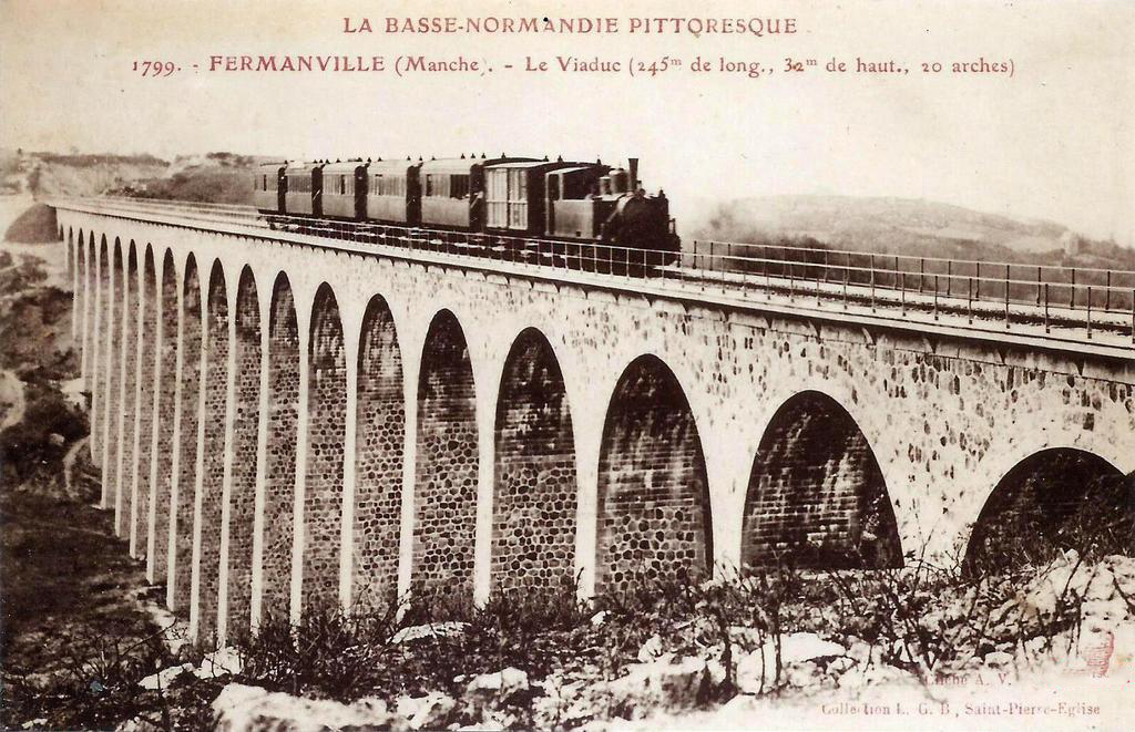 Passage d'un train sur le viaduc de Fermanville, Normandie, France.